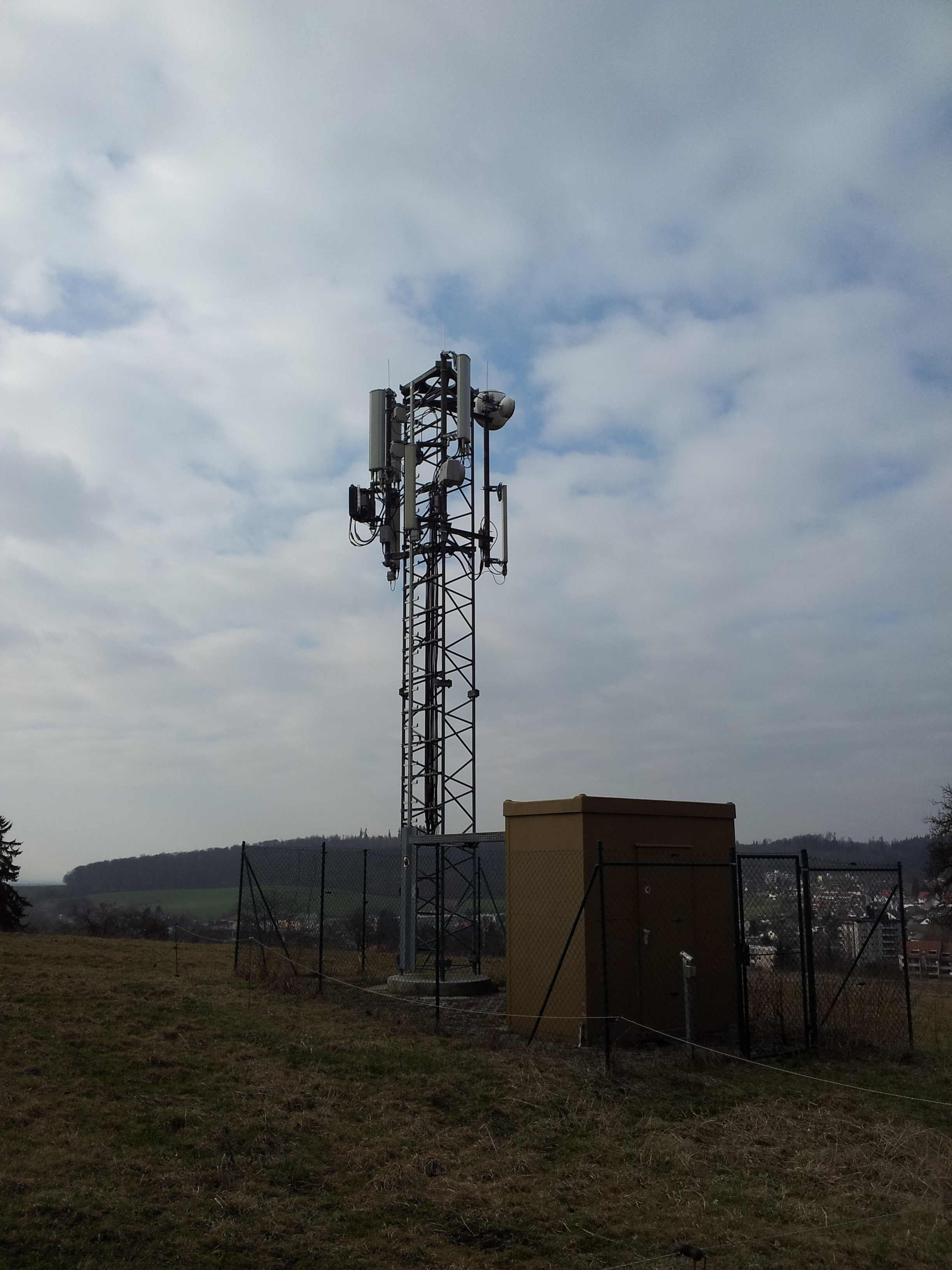 Vodafone and Telekom BTS in Mühltal Nieder/Ramstadt